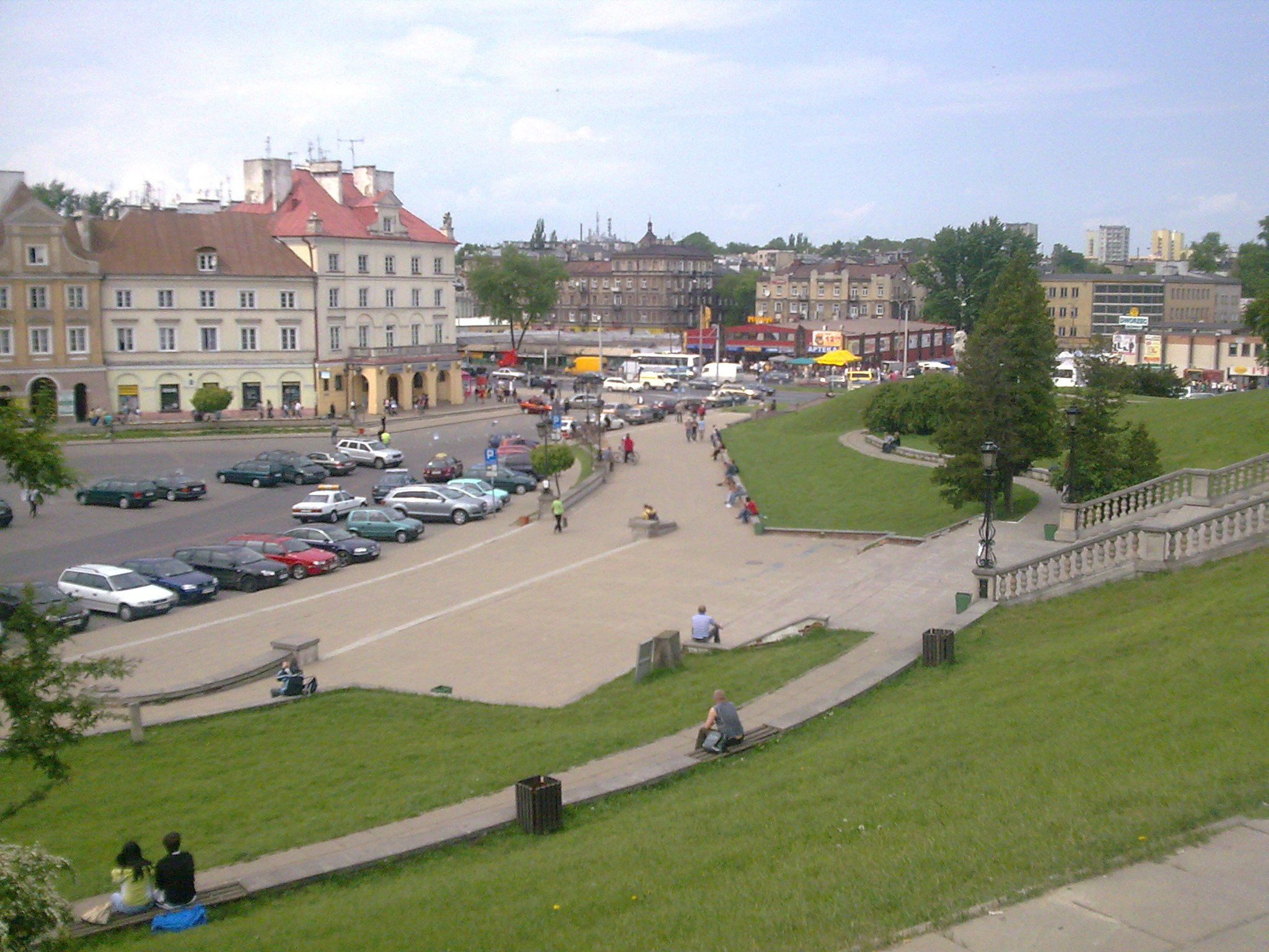 Plac Zamkowy w Lublinie